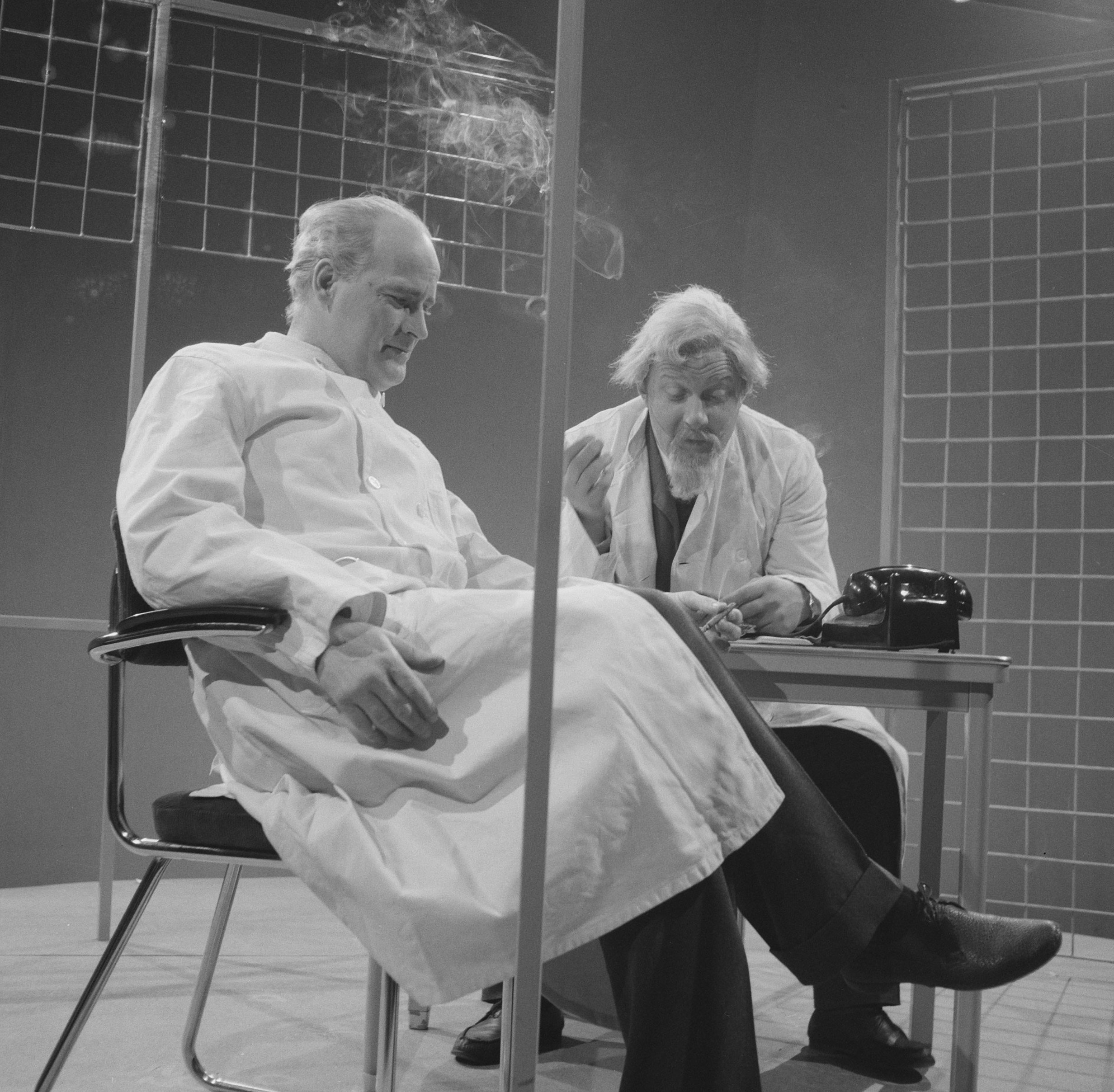 Collectie / Archief : Fotocollectie Anefo Reportage / Serie : [ onbekend ] Beschrijving : Kent U de Melkweg. Links Lo van Hensbergen en Kees Brusse Datum : 28 maart 1961 Persoonsnaam : Brusse, Kees, Hensbergen, Lo van Fotograaf : Lindeboom, Henk / Anefo Auteursrechthebbende : Nationaal Archief Materiaalsoort : Negatief (zwart/wit) Nummer archiefinventaris : bekijk toegang 2.24.01.03 Bestanddeelnummer : 912-2905